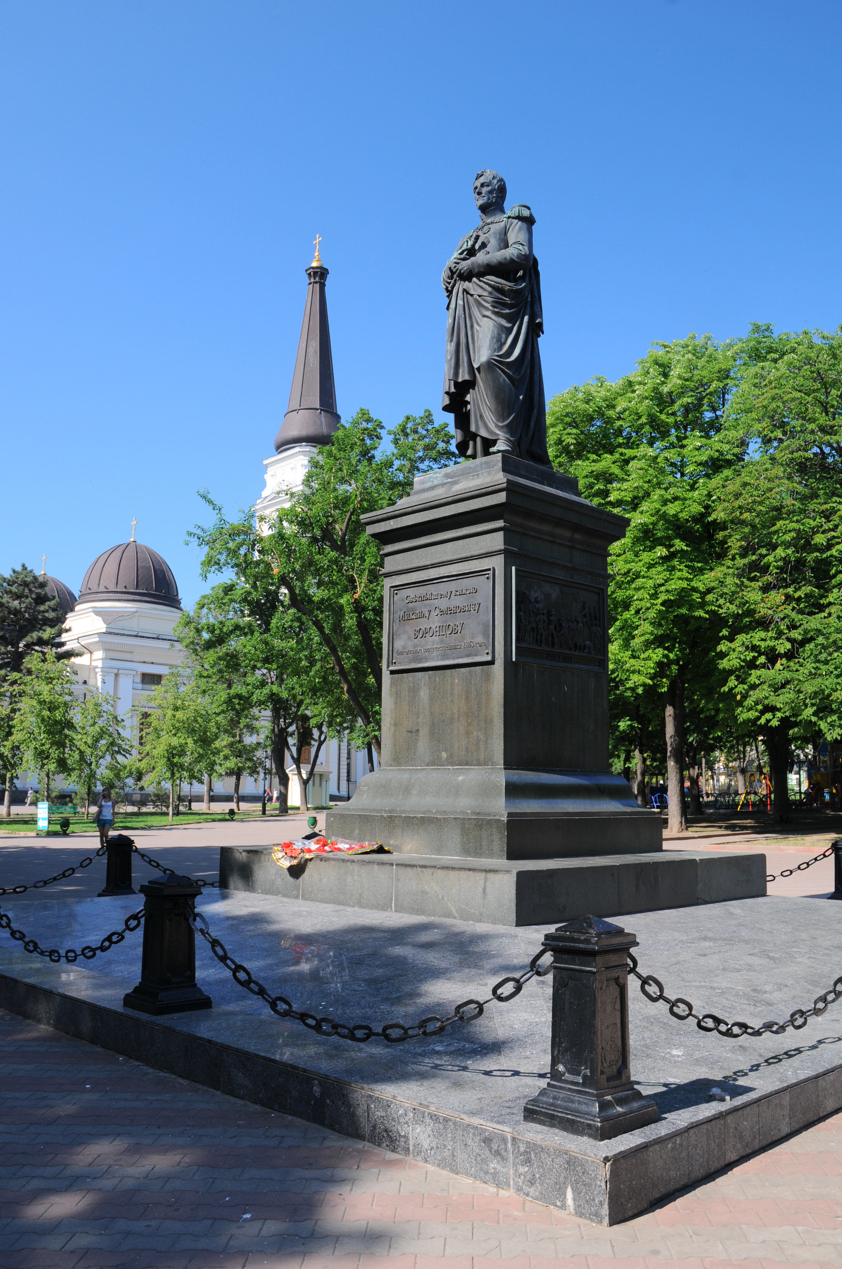 Одеса, пам'ятник Воронцову